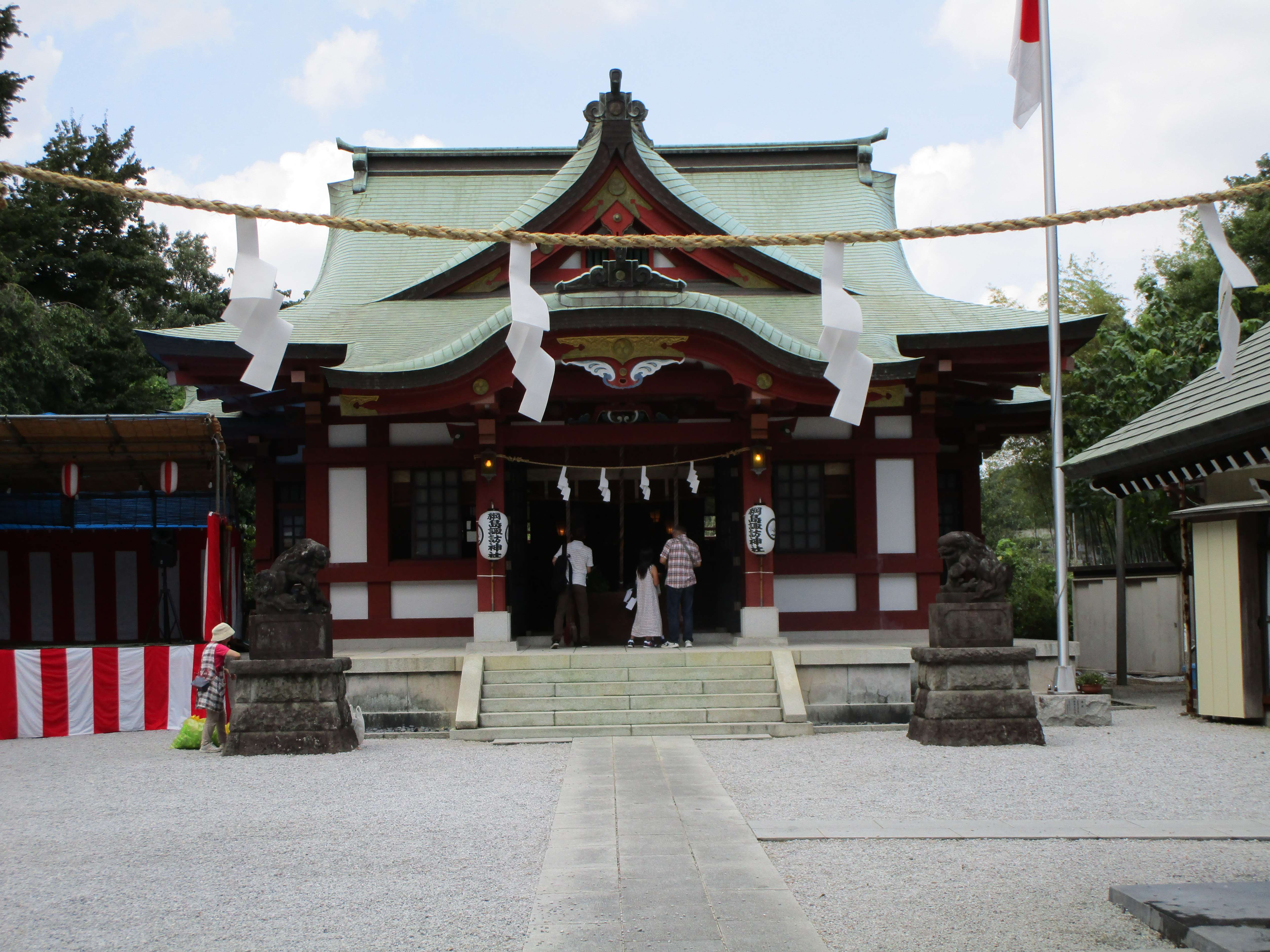 横浜市港北区の諏訪神社